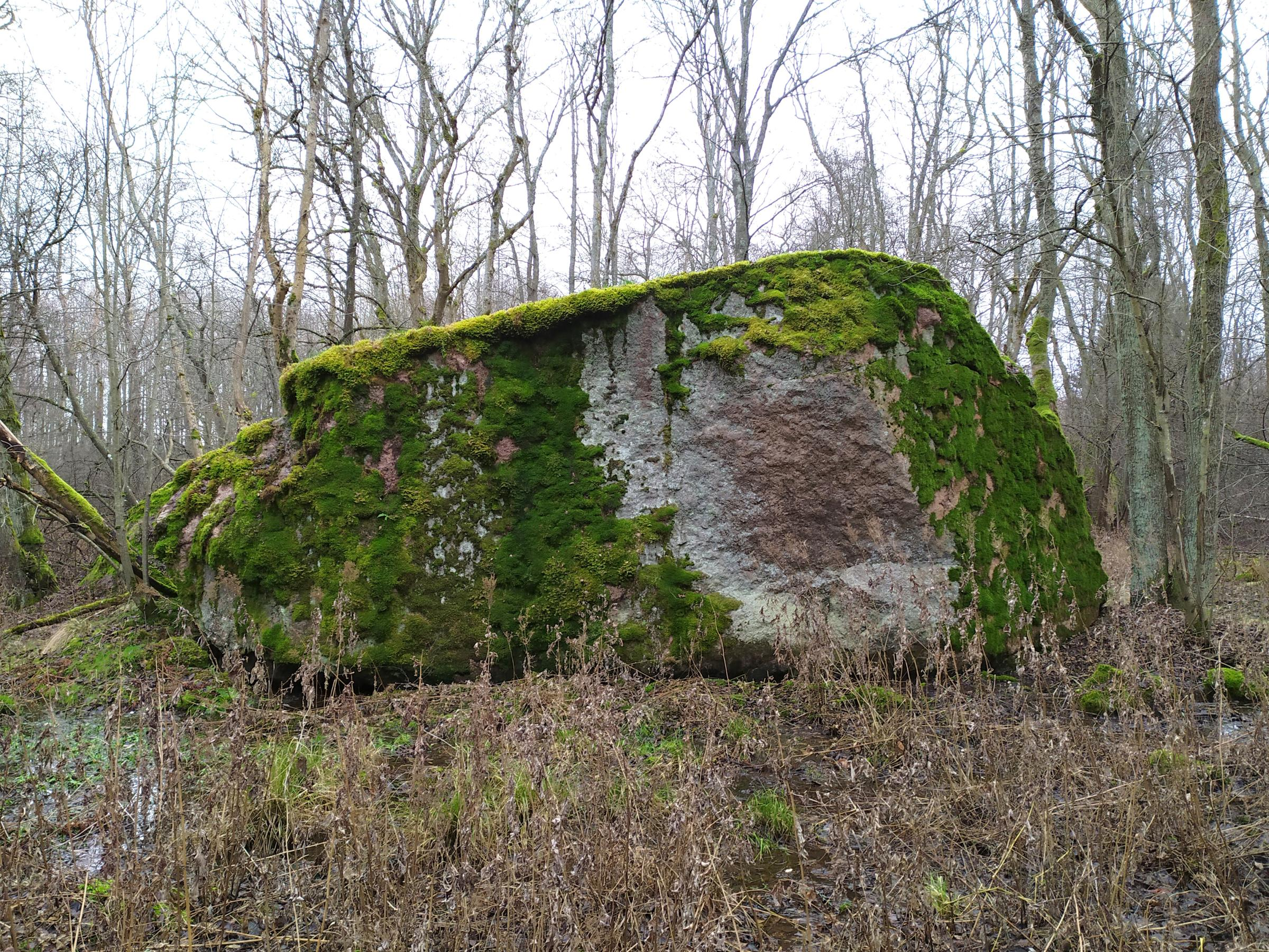 Hansumäe Keldrikivi on Muuga Hansumäe kivikülvi kõige suurem rändrahn.